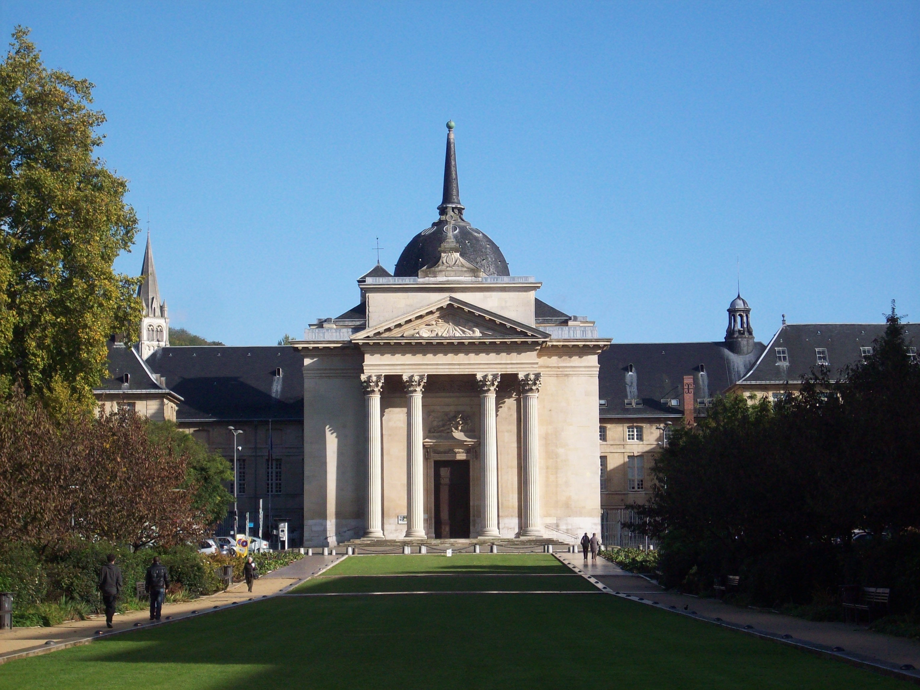 Eglise dédiée à Sainte-Madeleine, de l'ancien hôtel-Dieu, à l'ouest de Rouen.